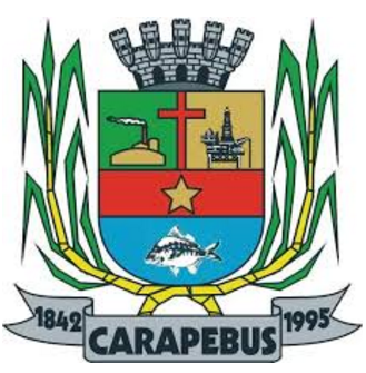 Brasão do município de Carapebus, no estado do Rio de Janeiro.